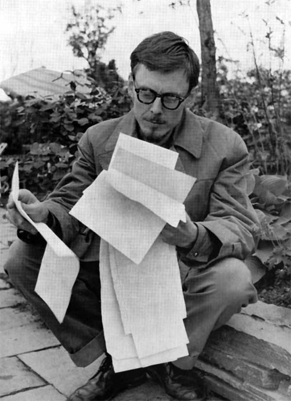 Ingemar Leckius